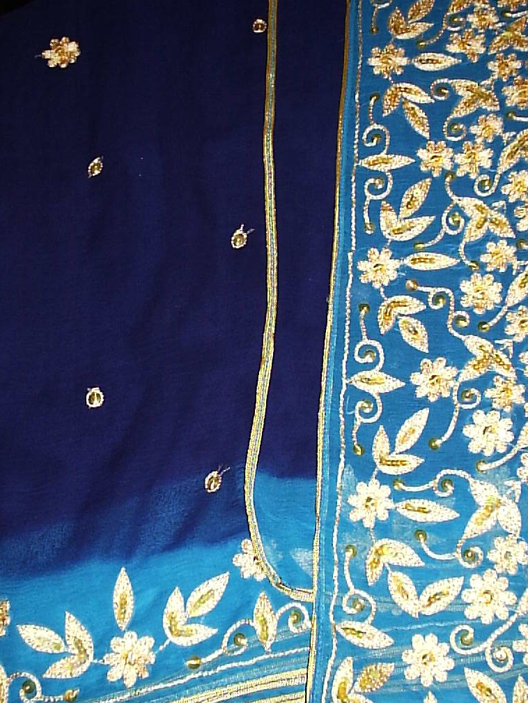 Turquoise Chiffon Sari.